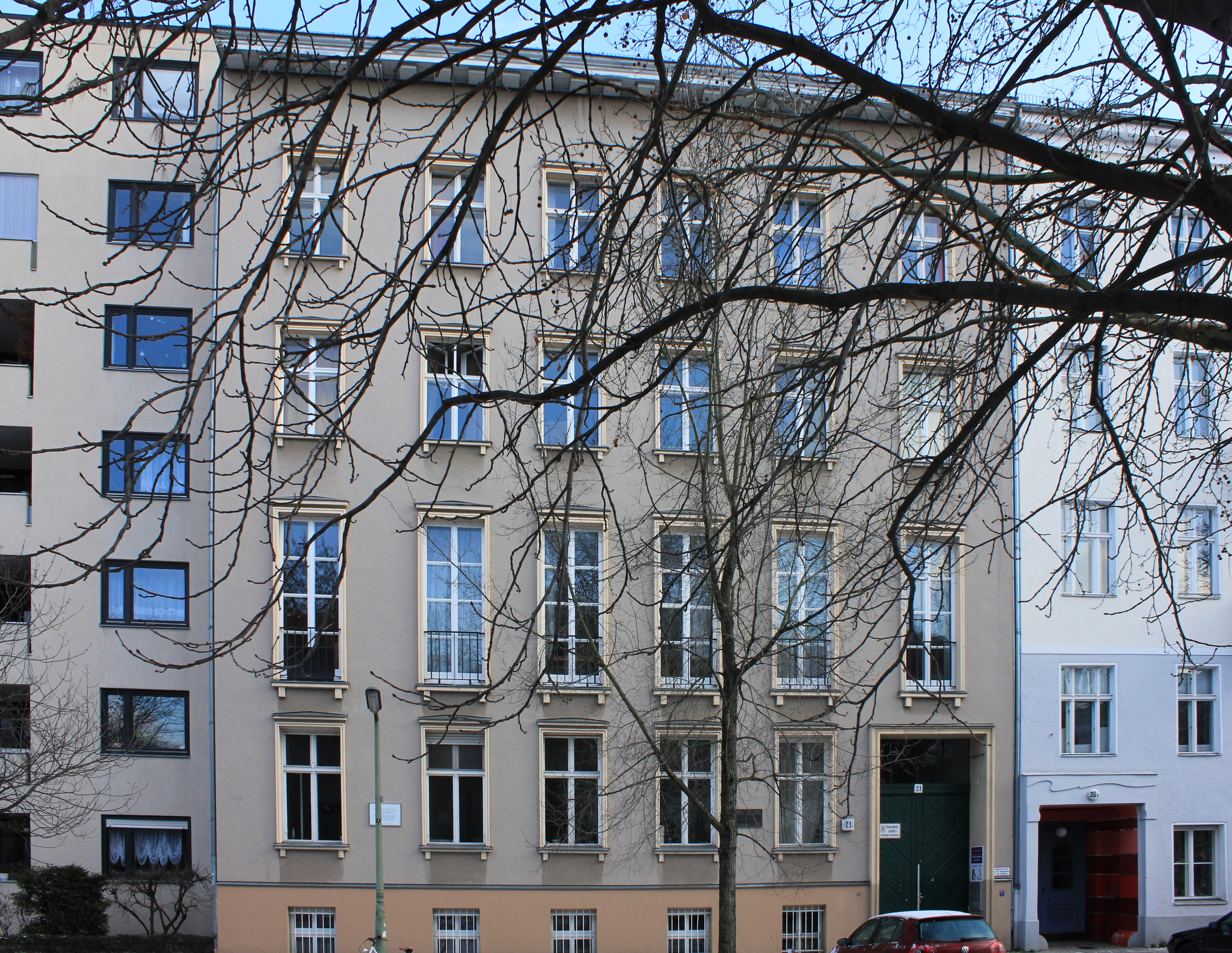 Ungersche Klinik 1904-05 von Breslauer und Salinger; Vorderhausfassade, 1936 von Böttcher